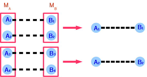 Skizze zur Illustration des Verschränkungsdestillationsprotokolls: zwischen Lokationen A und B werden viele schwach verschränkte Paare (A1B1, A2B2 usw.) erzeugt. Dann werden lokale unvollständige Messungen vorgenommen (zB auf den Systemen A1A2, auf B1B2 usw.). Stimmen die Resultate bei A und B überein, so wurde der verbleibende Teil des Systems A1A2B1B2 in einen Zustand projiziert, der stärker verschränkt ist, als die Ausgangszustände (A1B1 usw.)